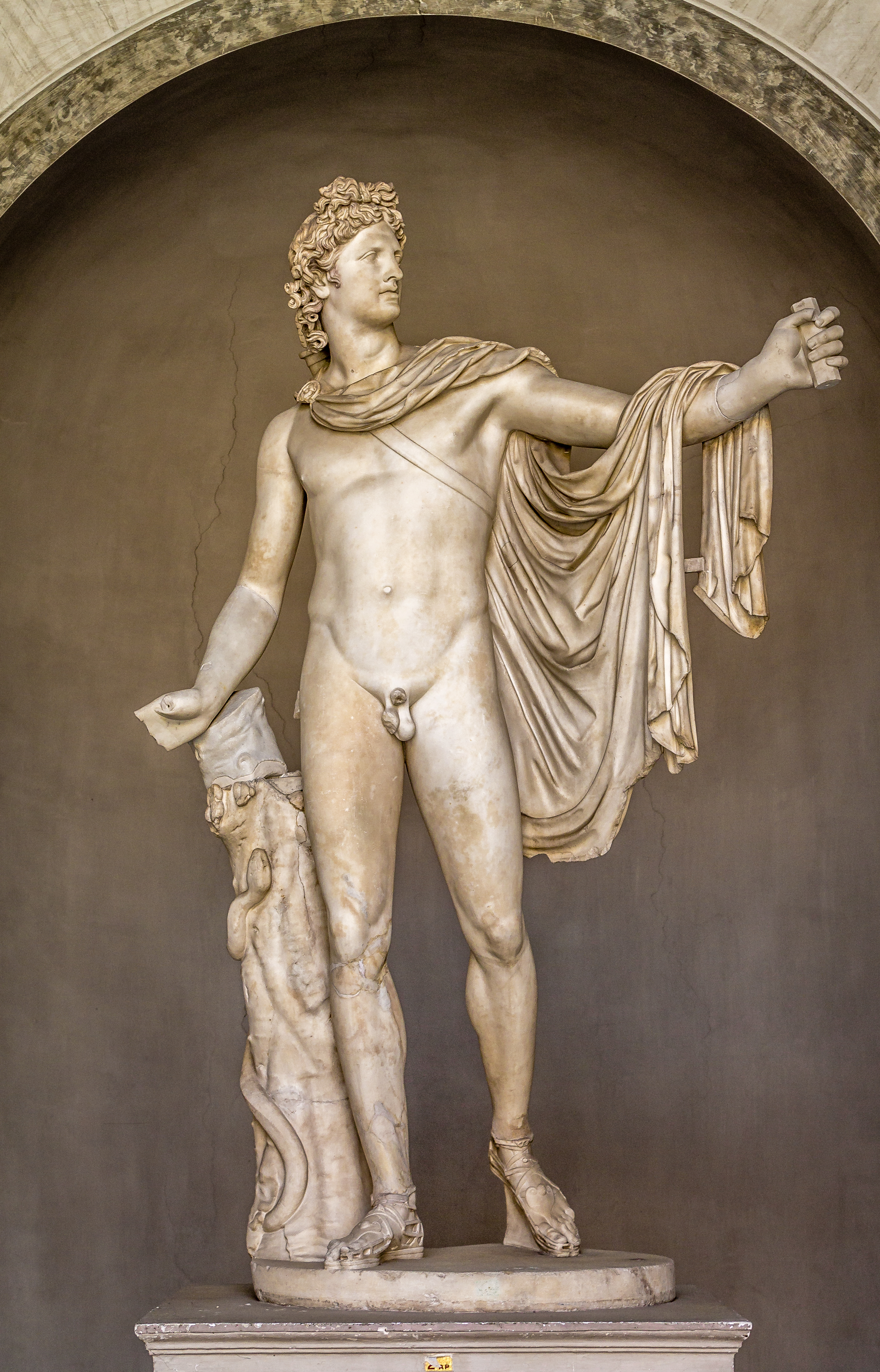 Apollo del Belvedere